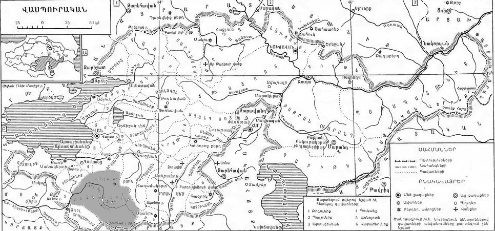 Վասպուրական